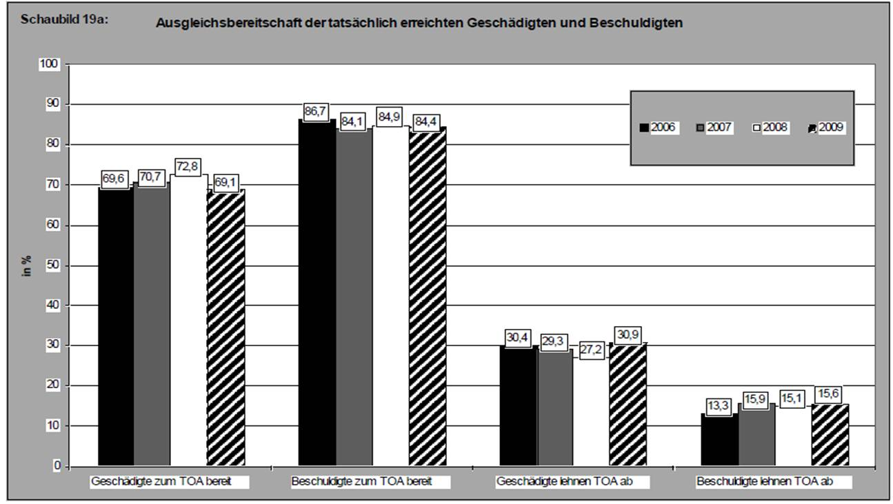 Die Statistik beschreibt für die Jahre 2006-2009 die Ausgleichsbereitschaft der Beteiligten eines Täter-Opfer-Ausgleichs